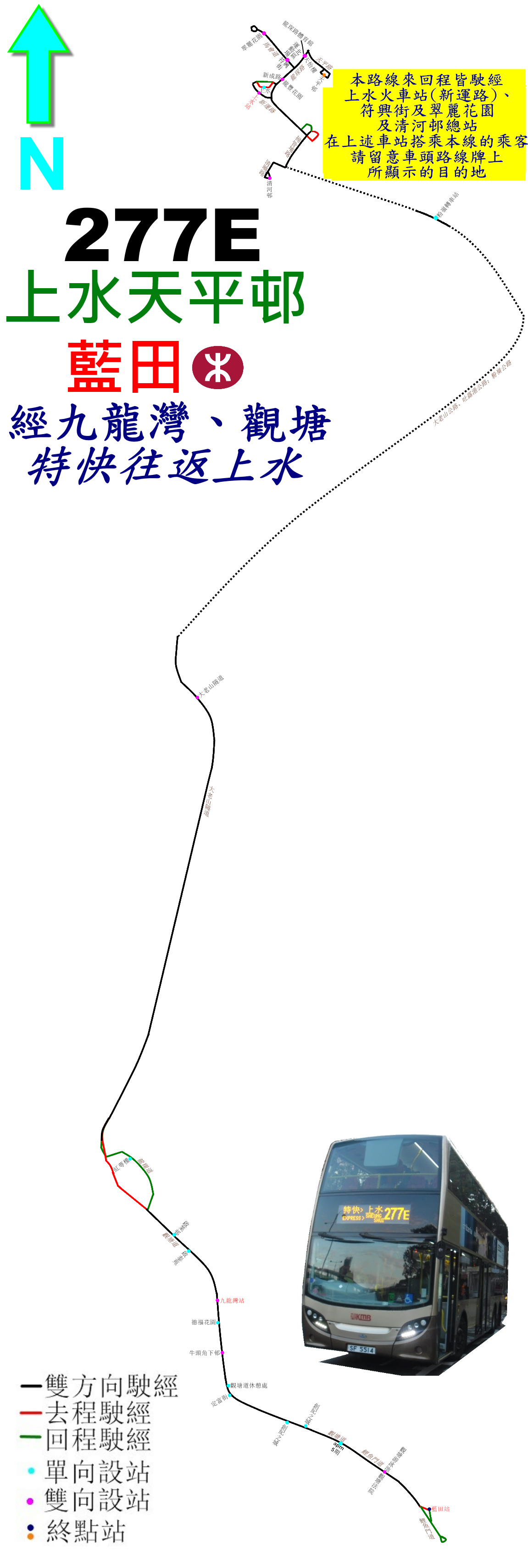 中文（香港）: 九巴277E線的走線圖